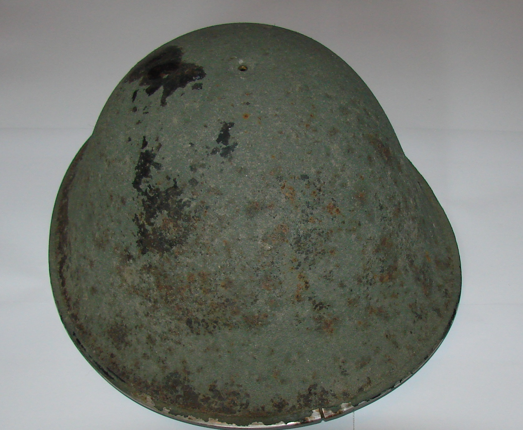 Photographie d'un casque canadien Mk.IV dit "turtle" ayant servi durant la Seconde guerre mondiale.